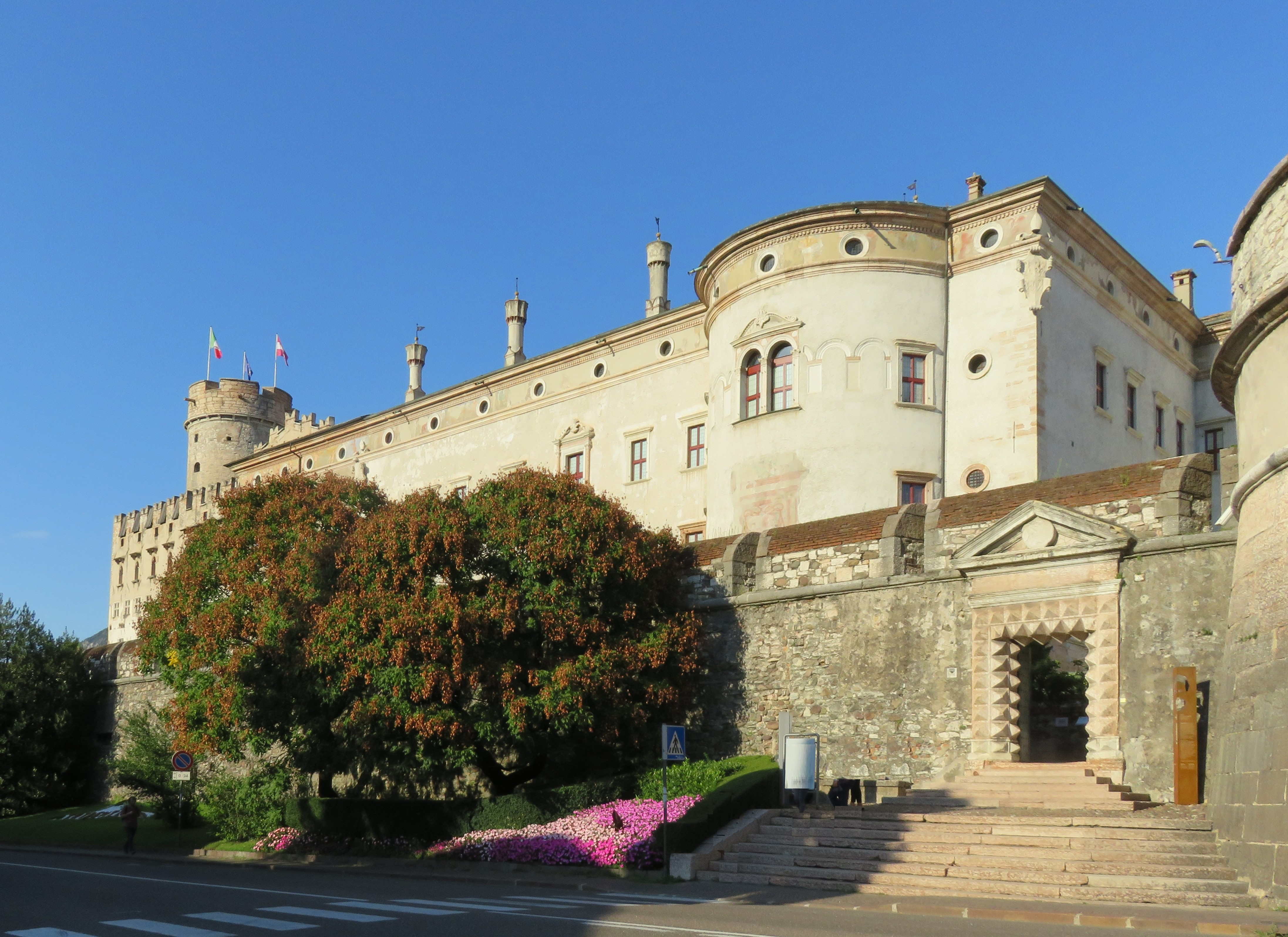 il Castello